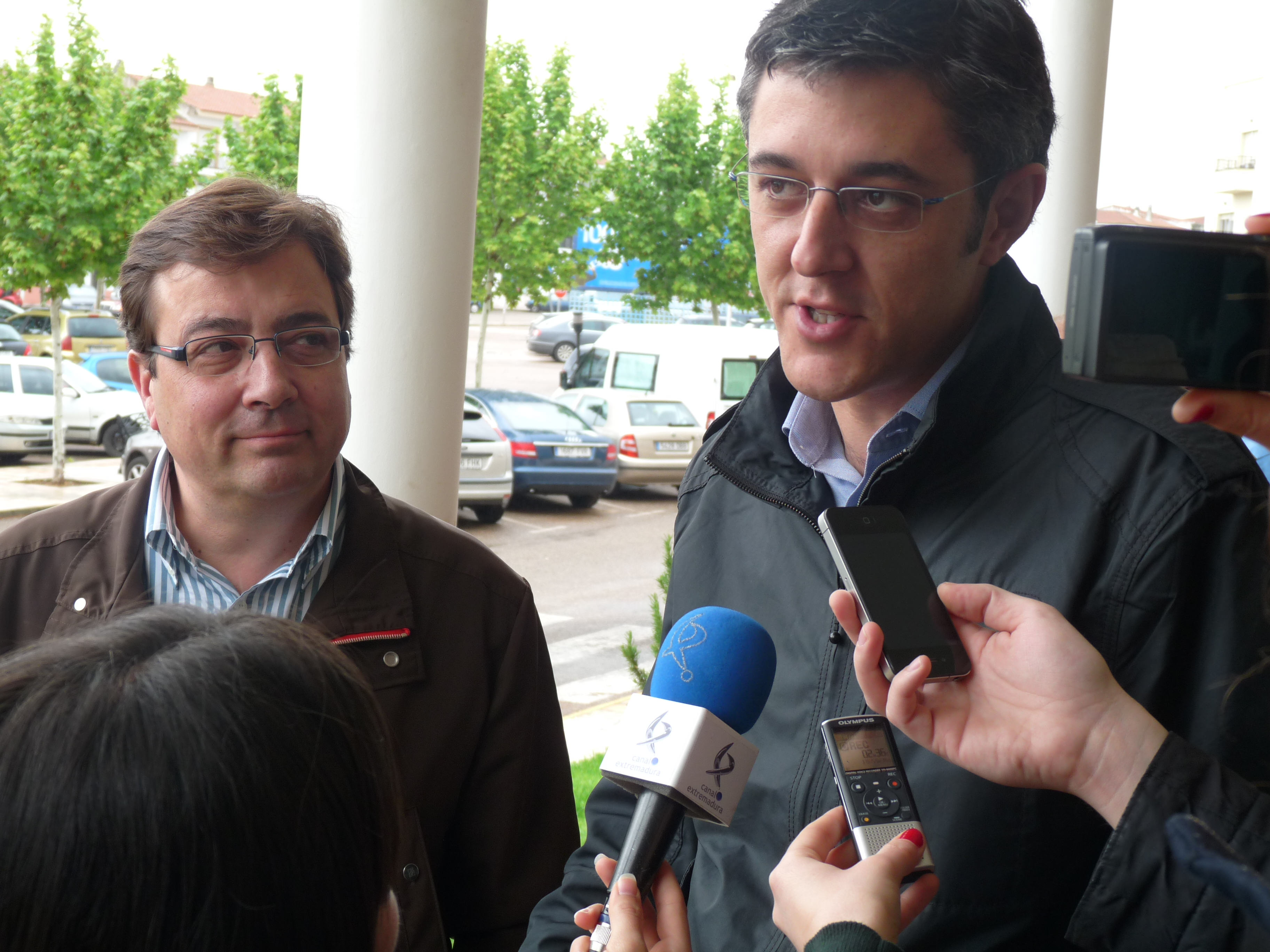 Jornadas de Juventudes Socialistas de Olivenza con Eduardo Madina y Guillermo Fernández Vara